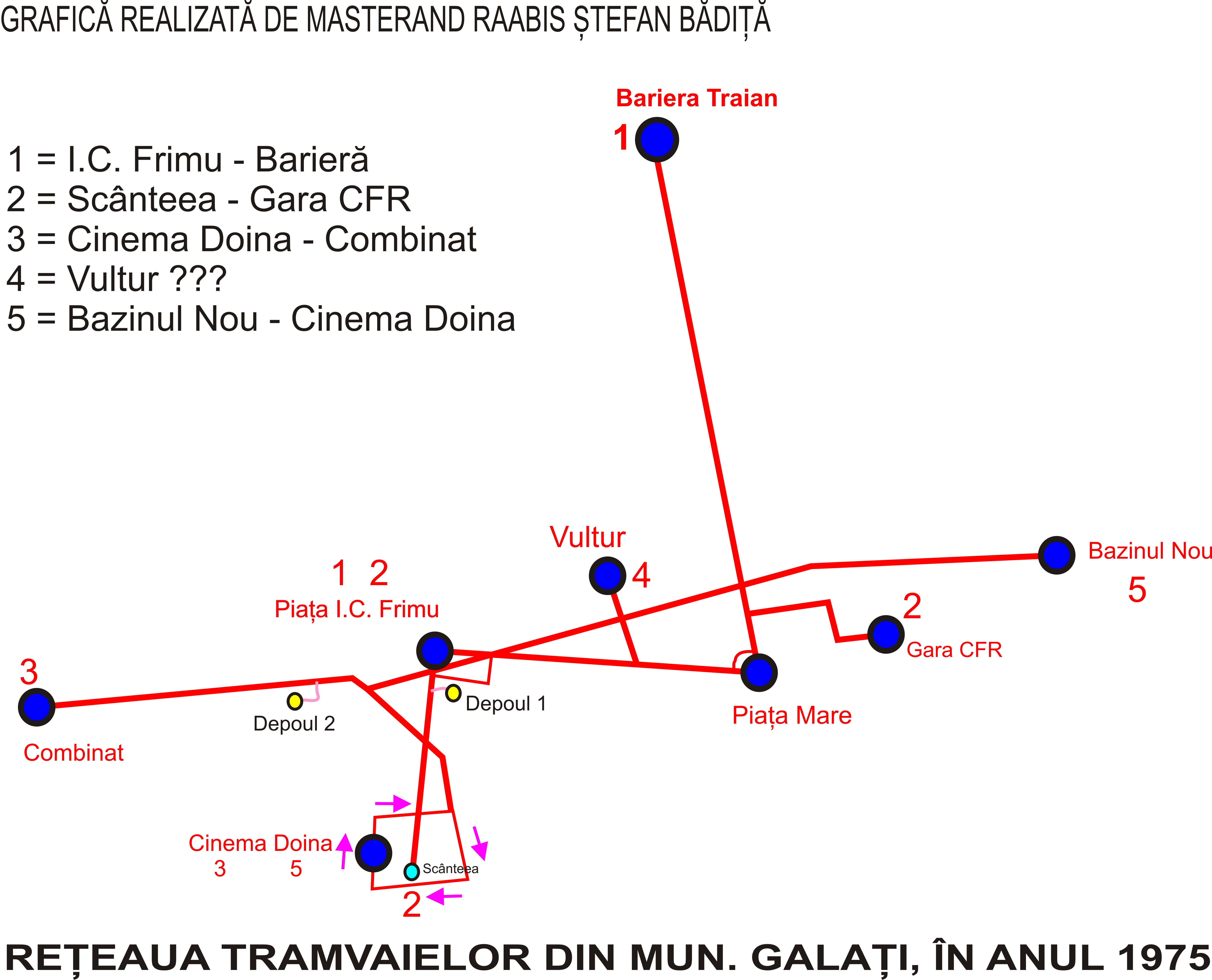 Reteaua de tramvaie galatene in 1975